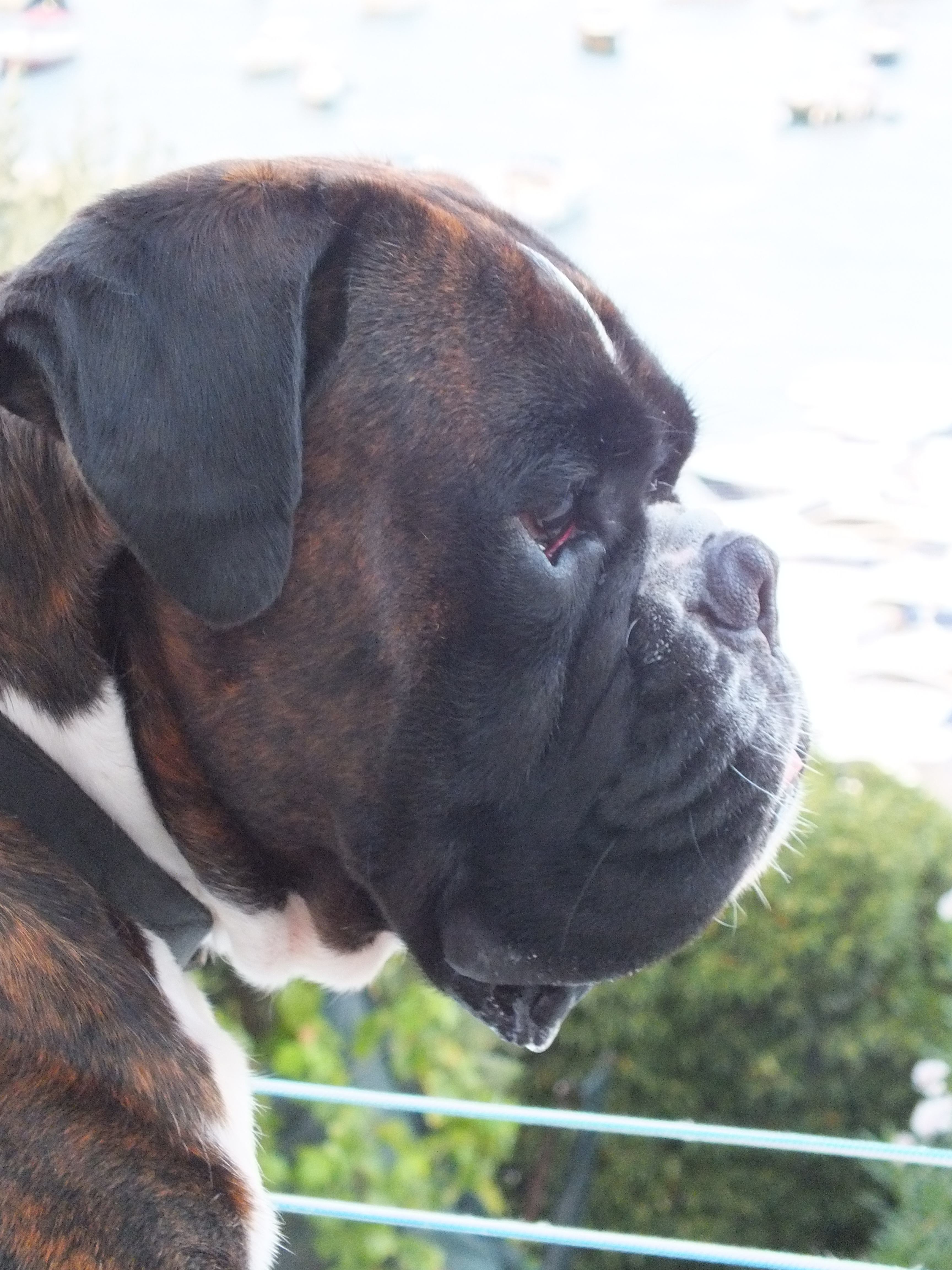 Cane di razza boxer - nato nel 2010